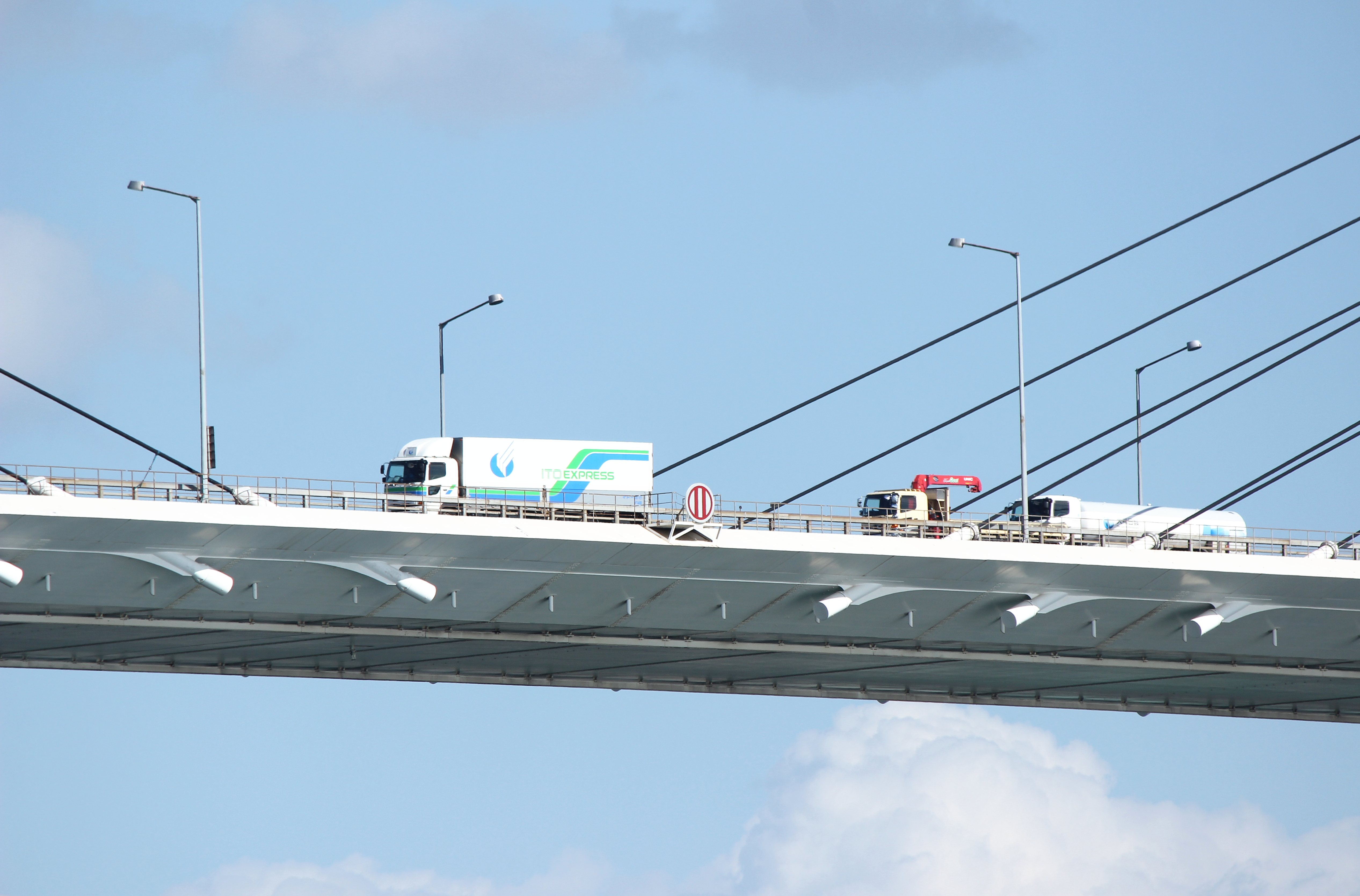 名港東大橋中央部。潮見ふ頭から撮影。